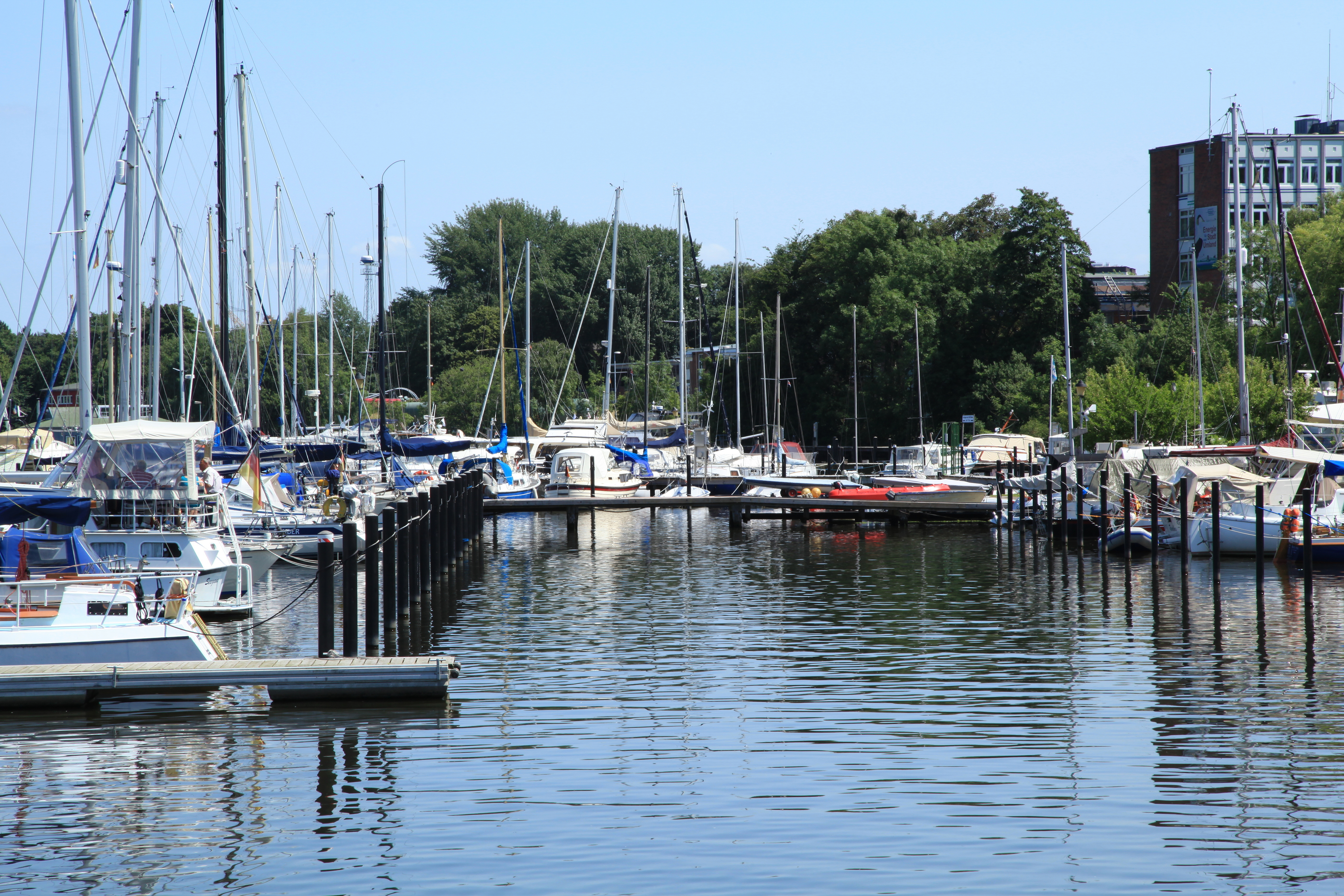 Blick von Am Obereiderhafen zur Marina des Regatta-Vereins Rendsburg, Am Eiland in Rendsburg